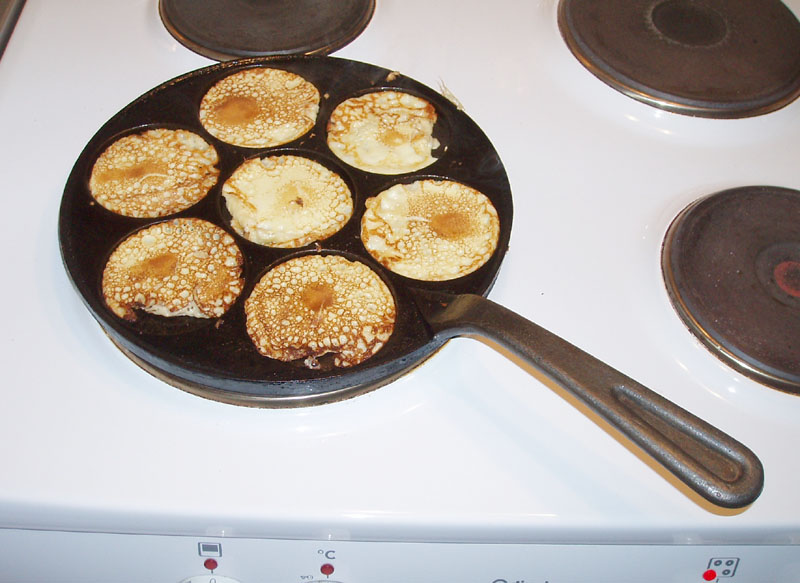 Plättlagg. Foto: Krister Valtonen. Plättar som steks i ett plättlagg av gjutjärn. Foto: Krister Valtonen.